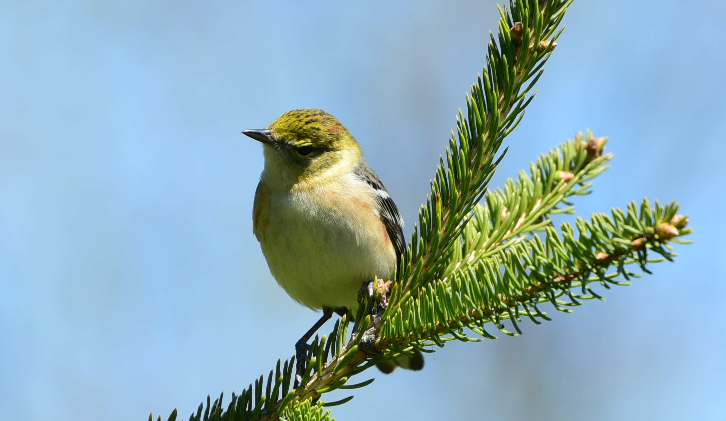 Пісняр-лісовик каштановий (Setophaga castanea) у позашлюбному оперенні в парку Полковника Семюела Сміта в Торонто